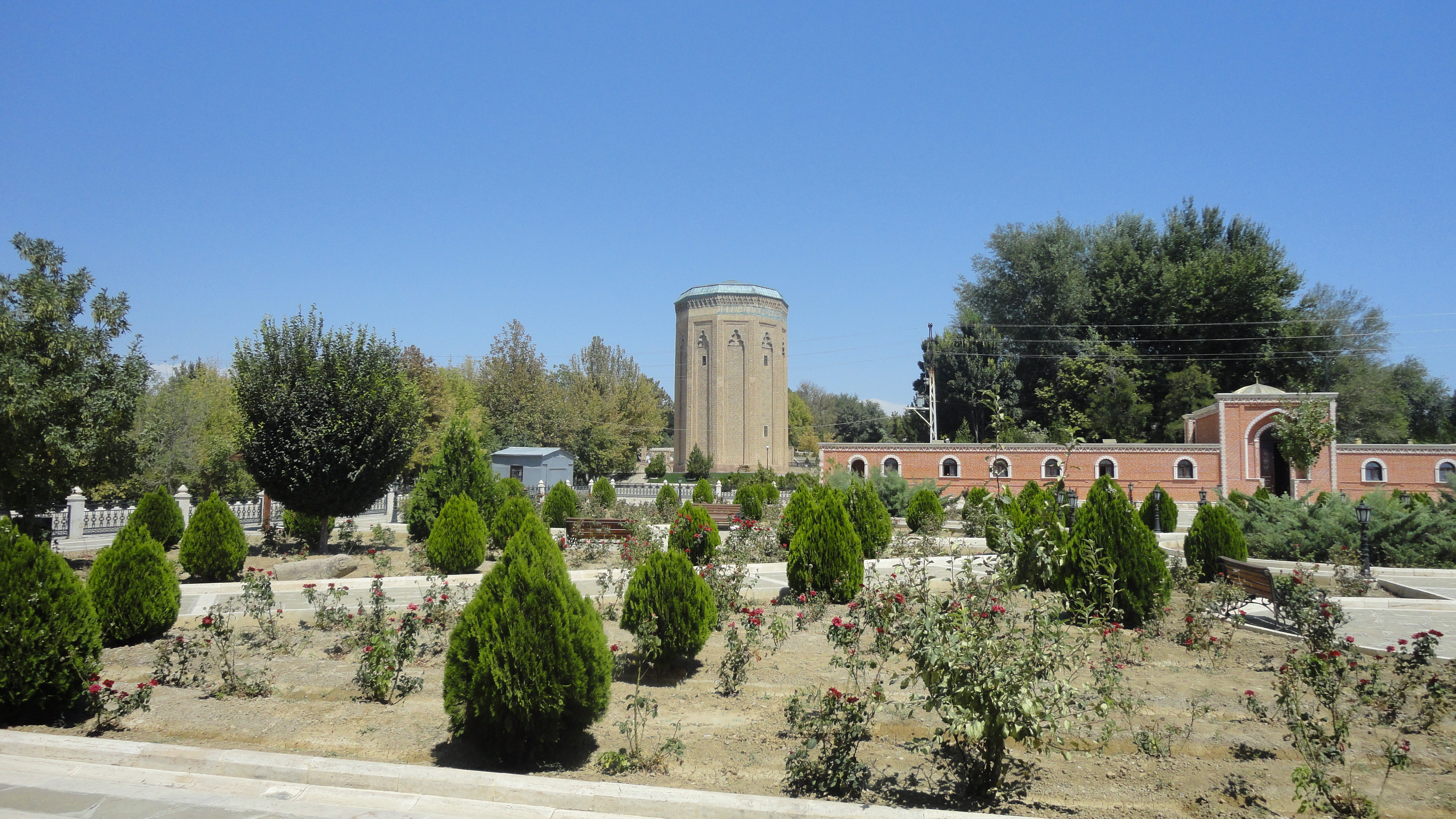 Əcəmi Seyrangahı: Naxçıvan xan sarayının həyəti. Həyətə girişdəki tikili. Möminə Xatun türbəsi